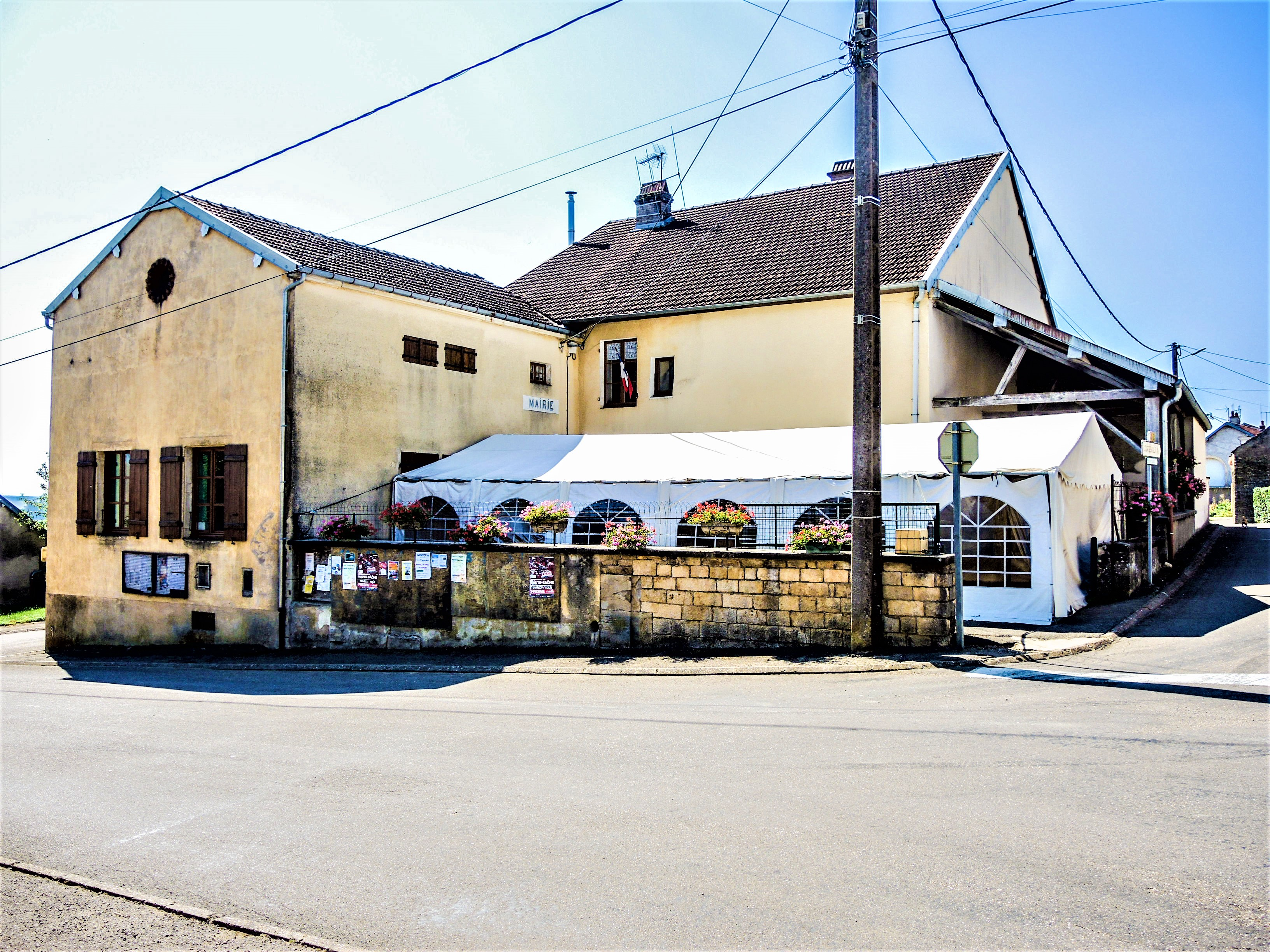 Mairie